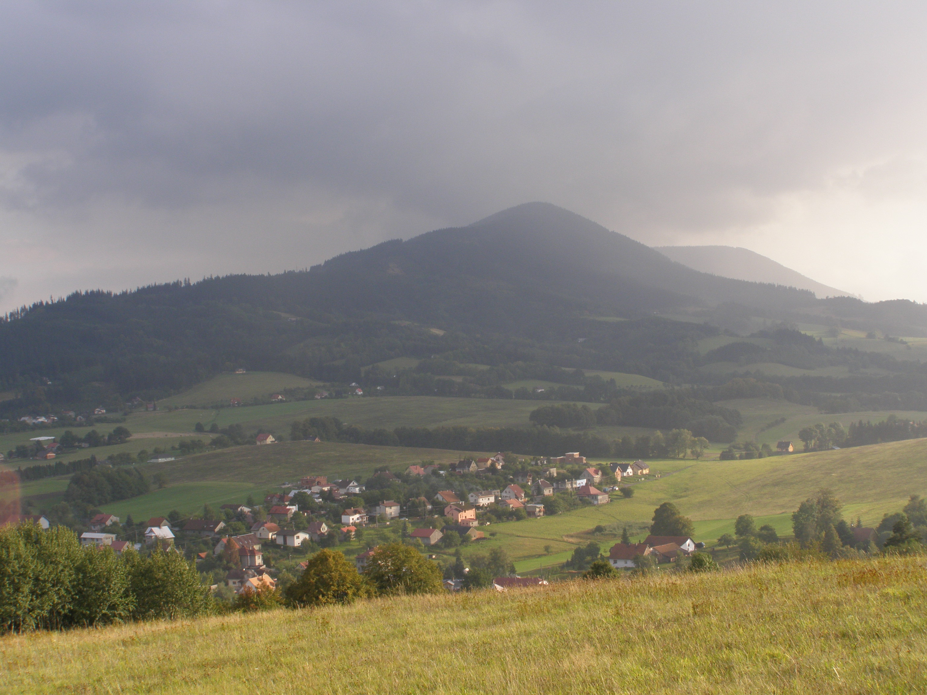 Ondřejník, pohled z Metylovic